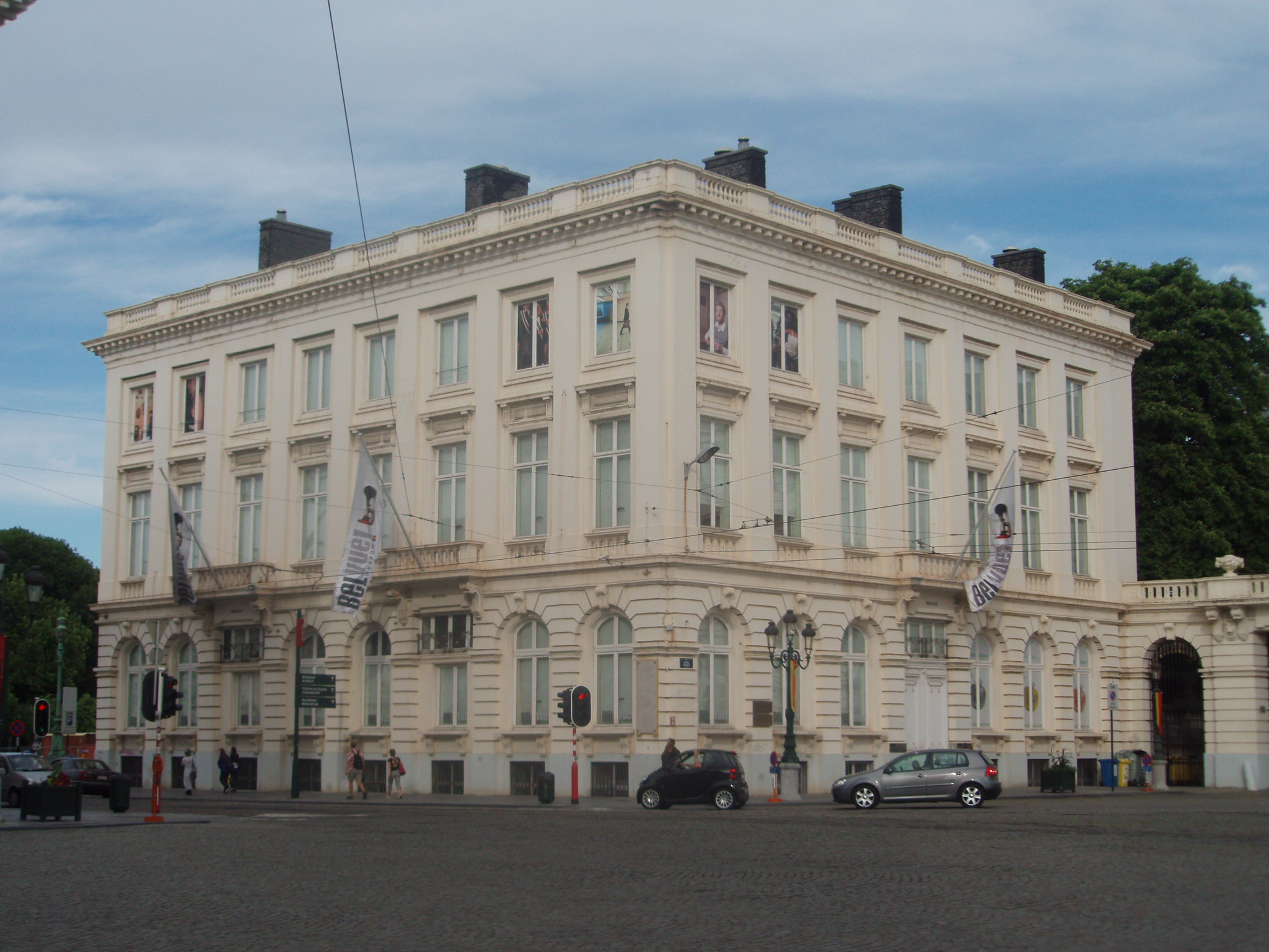 Musee Margrite